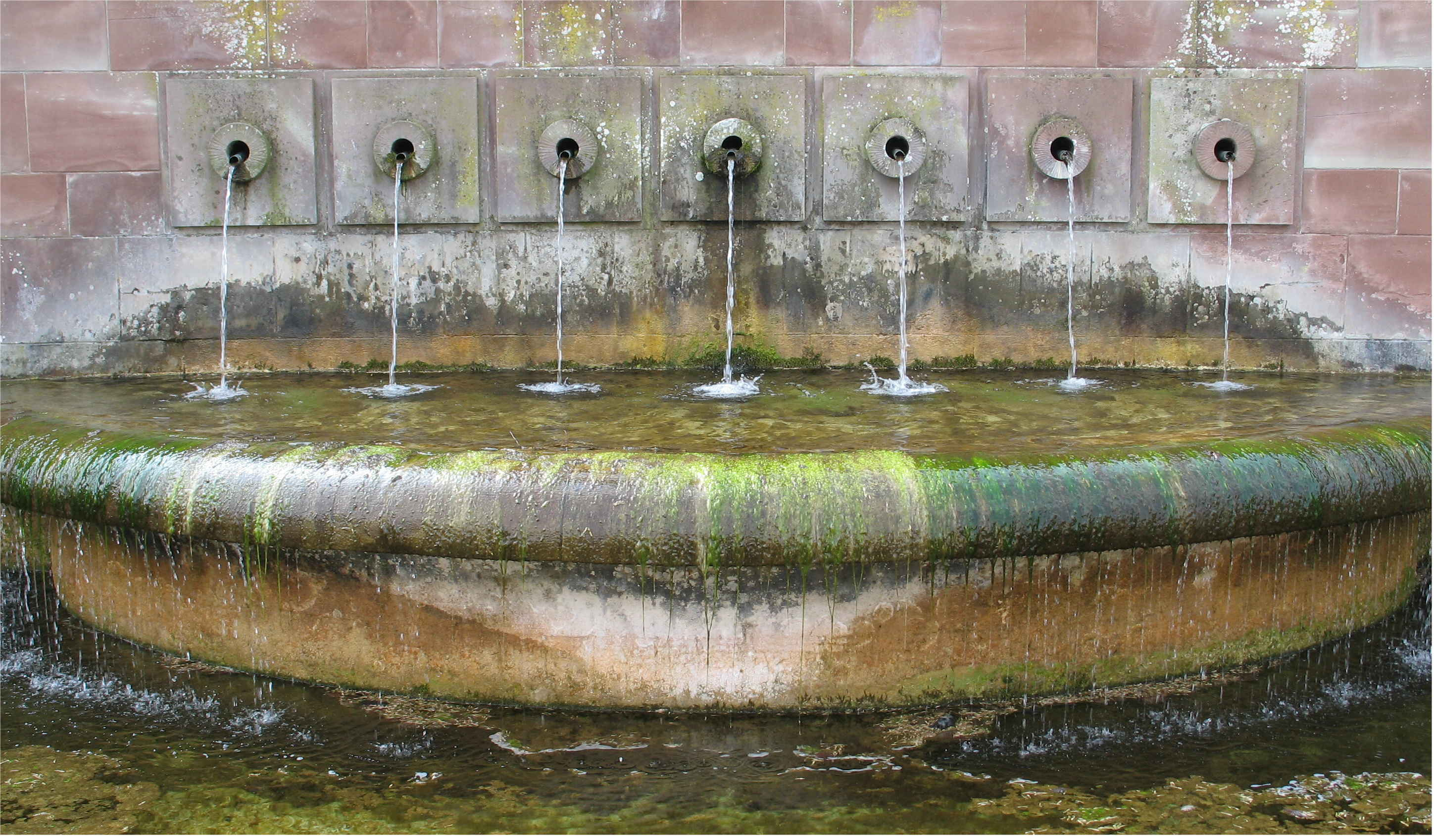 Simmer Septfontaines. Kategorie:Gemeng Simmer